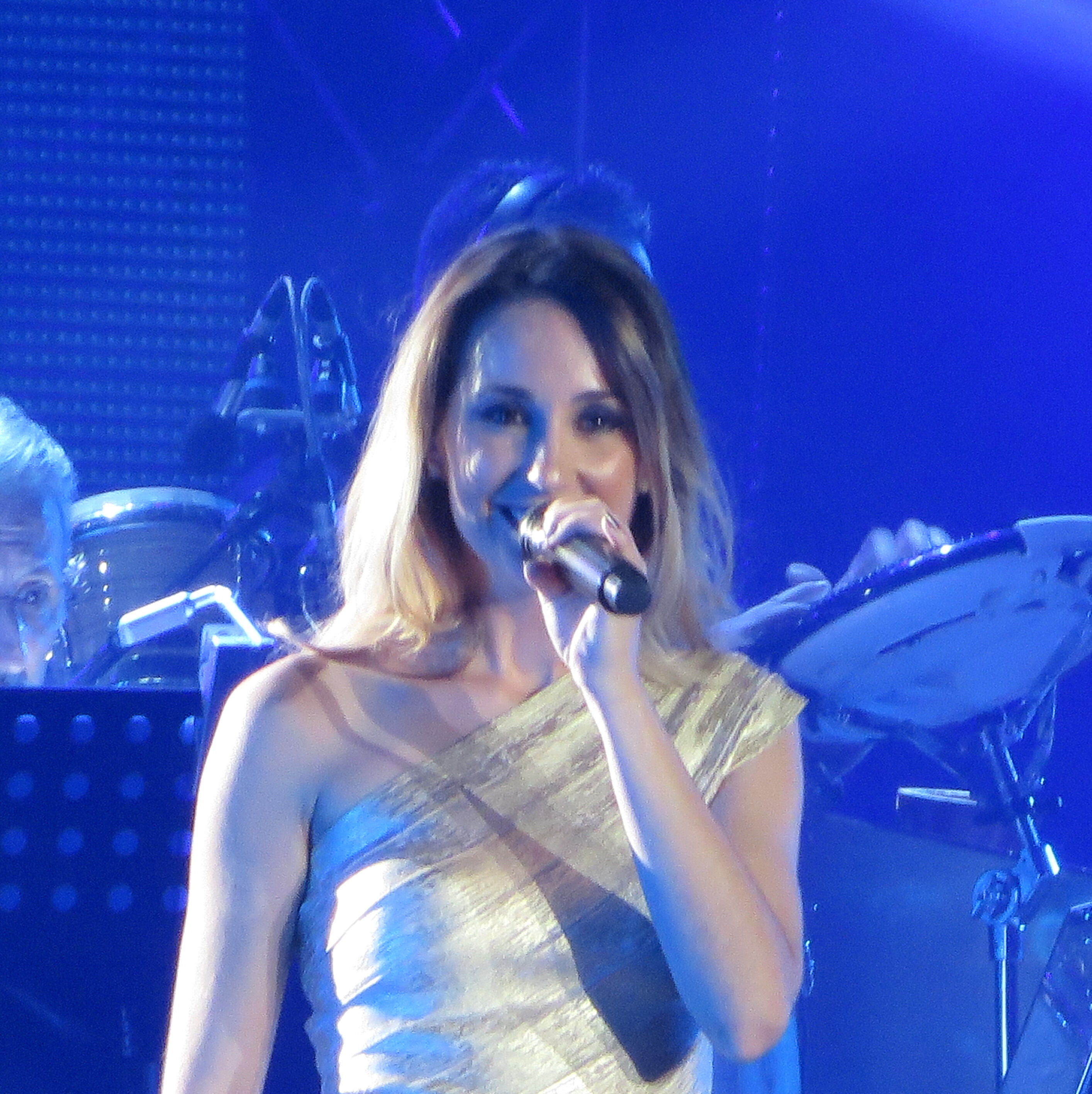 Actuación de Mireia en el concierto conmemorativo del 15 aniversario de OT en el Palau Sant Jordi de Barcelona (31-10-2016)